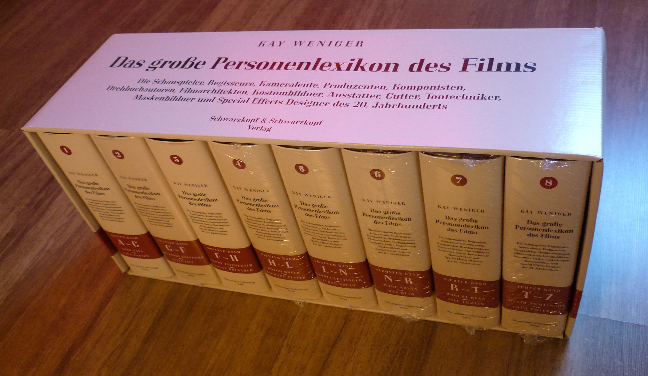 Bild des Großen Personenlexikon des Films im Schuber